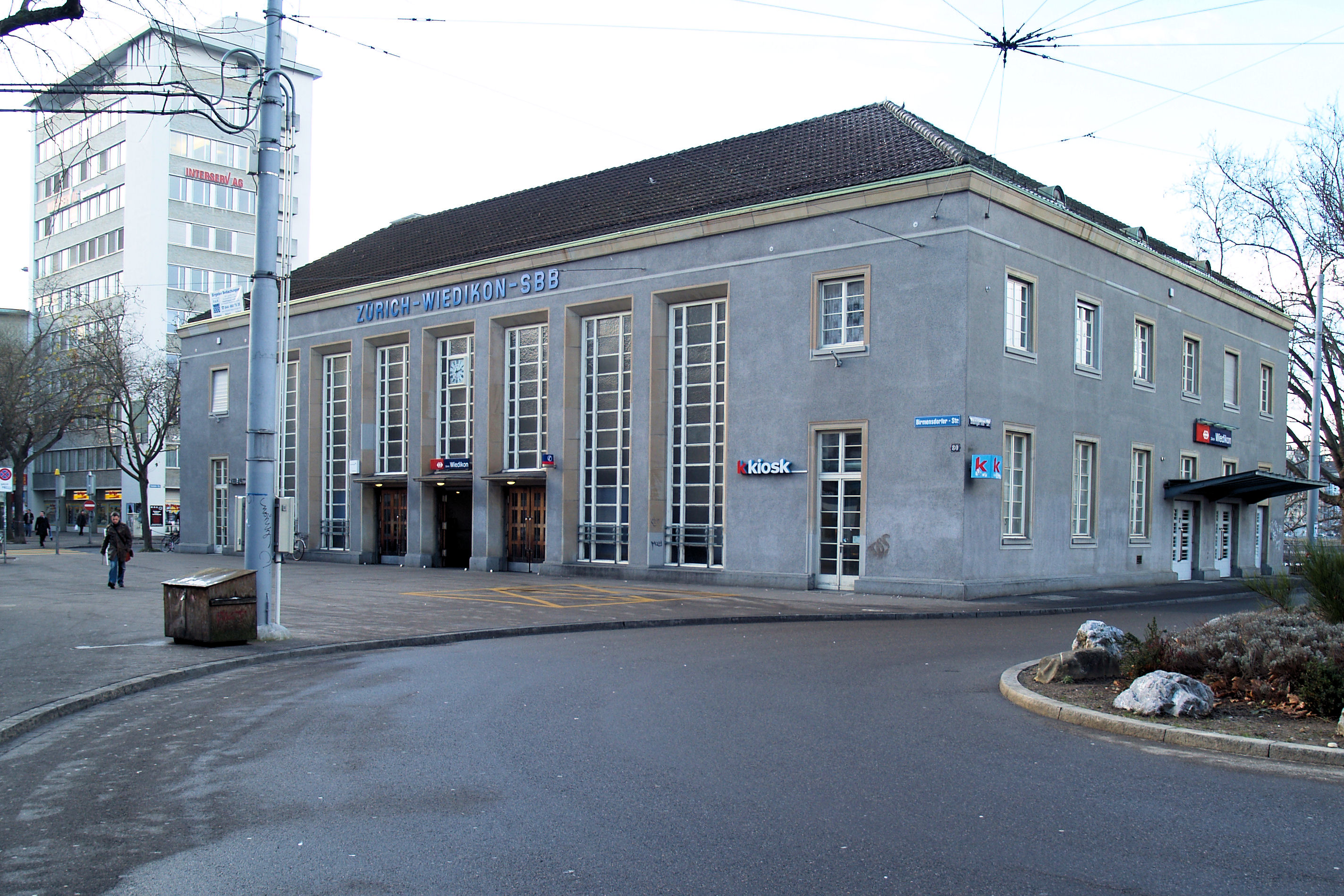 Bahnhofgebäude des Bahnhof Zürich Wiedikon